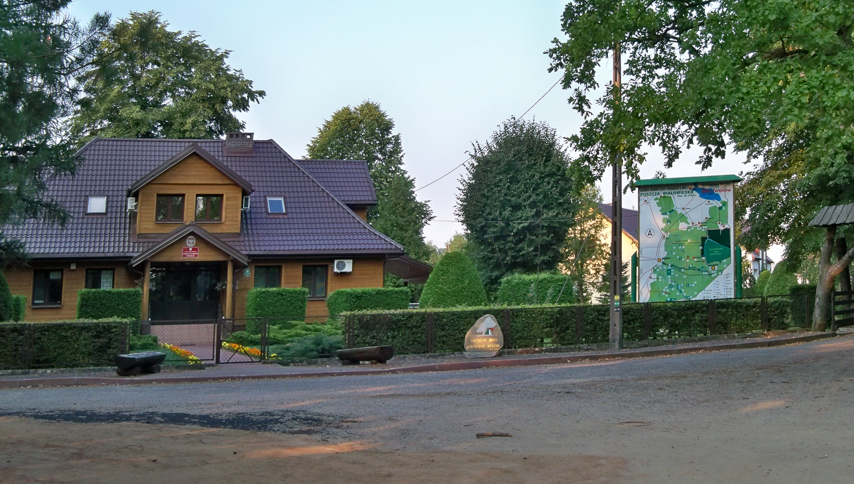 Siedziba Nadleśnictwa Browsk w Gruszczewinie, Gruszki 10